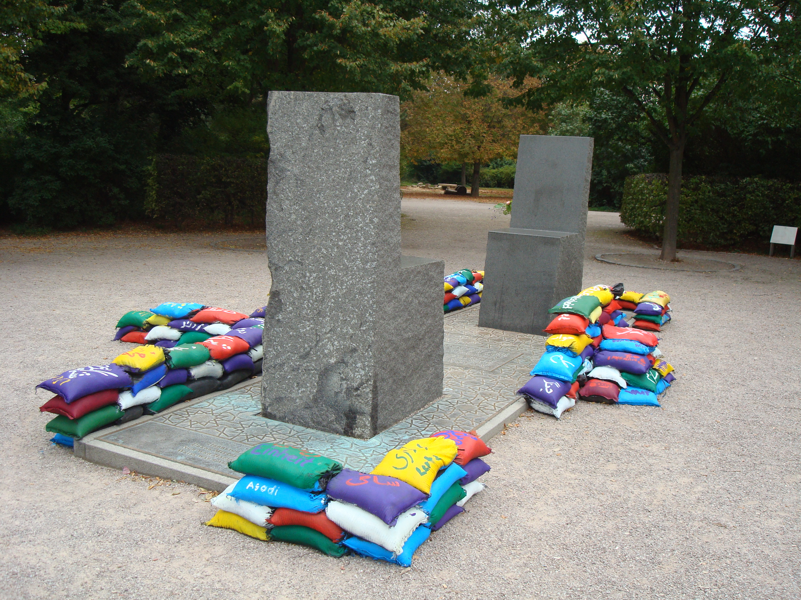 Das Goethe-Hafez-Denkmal auf dem Beethovenplatz in Weimar im Herbst 2013, anlässlich des 5. Hafez-Gedenktages Weimar versehen mit einer Kunstinstallation von Pirusan Mahboob zum Thema "Krieg und Frieden" aus bunten, beschriebenen Sandsäcken.